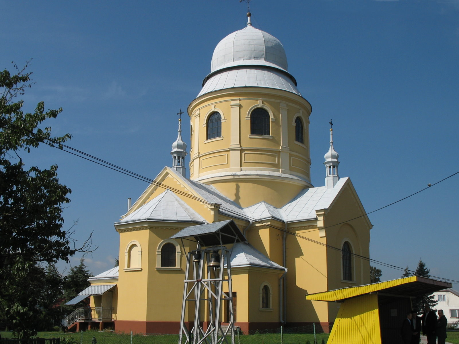 Niemstów - zespół dawnej cerkwi greckokatolickiej, obecnie kościół rzymskokatolicki pw. Narodzenia NMP - cerkiew greckokatolicka, obecnie kościół rzymskokatolicki pw. Narodzenia NMP - cmentarz przy cerkwi greckokatolickiej, obecnie kościele rzymskokatolickim pw. Narodzenia NMP Zabytek nr A-69 z 24.02.2003